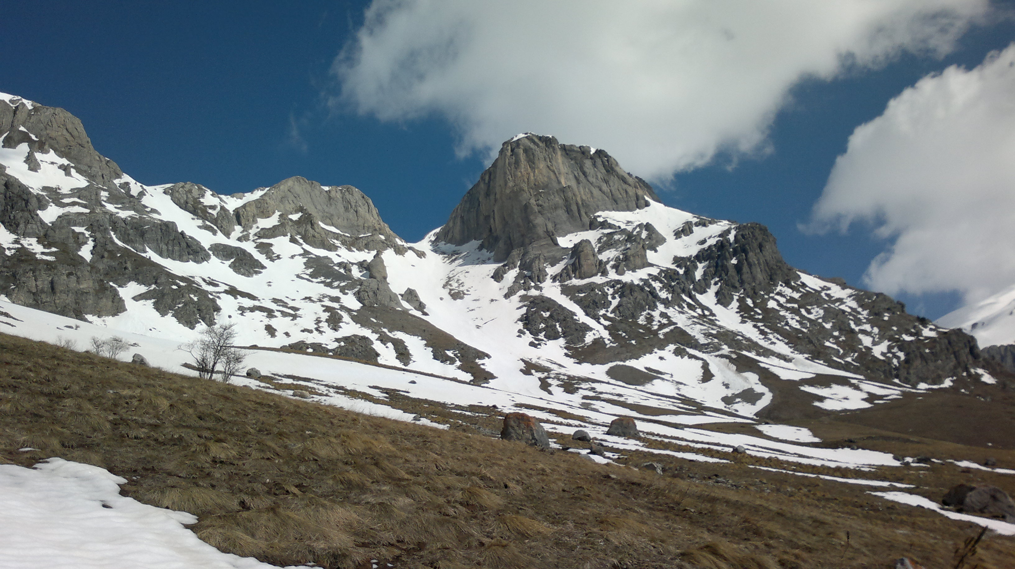 Mongioie. Al centro della foto il Canale delle Scaglie fotografato dai pendii sopra Pian Rosso